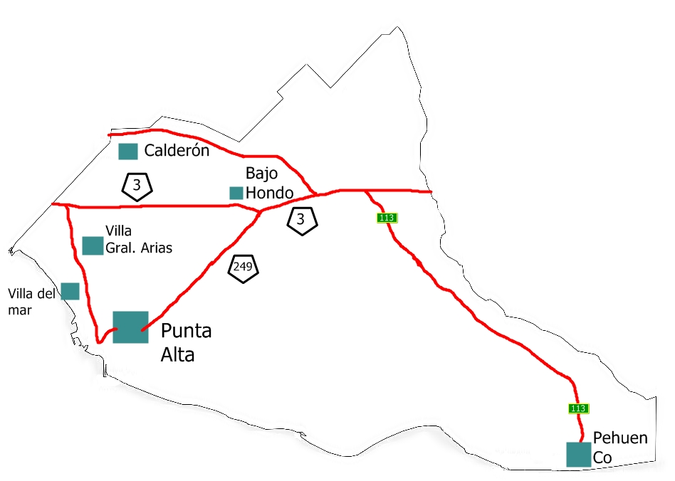 Mapa del Partido de Coronel Rosales, con sus respectivas localidades y las rutas que lo atraviesan.